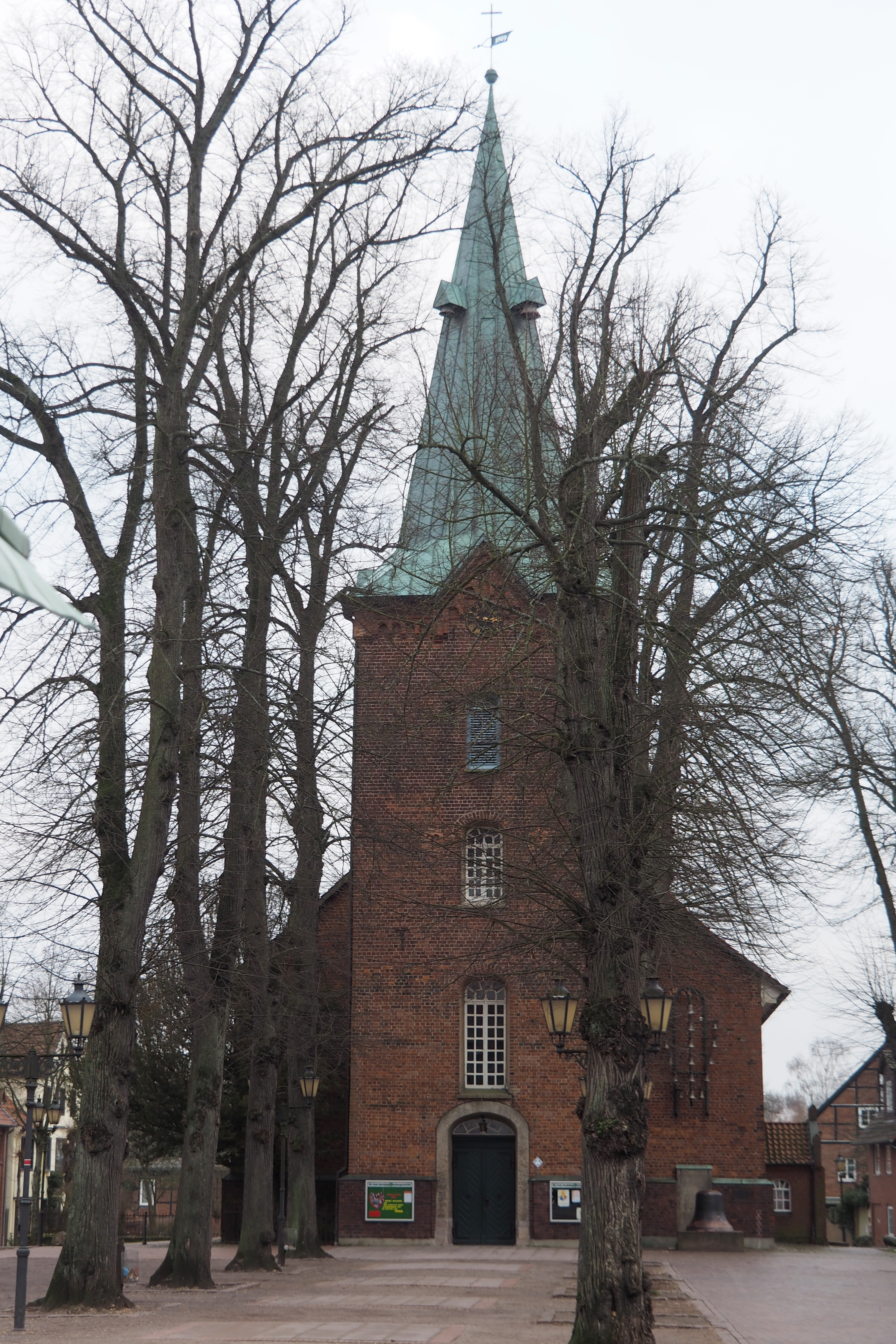 Turm mit Glockenspiel der Evangelisch lutherische Dreikönigskirche in Bad Bevensen